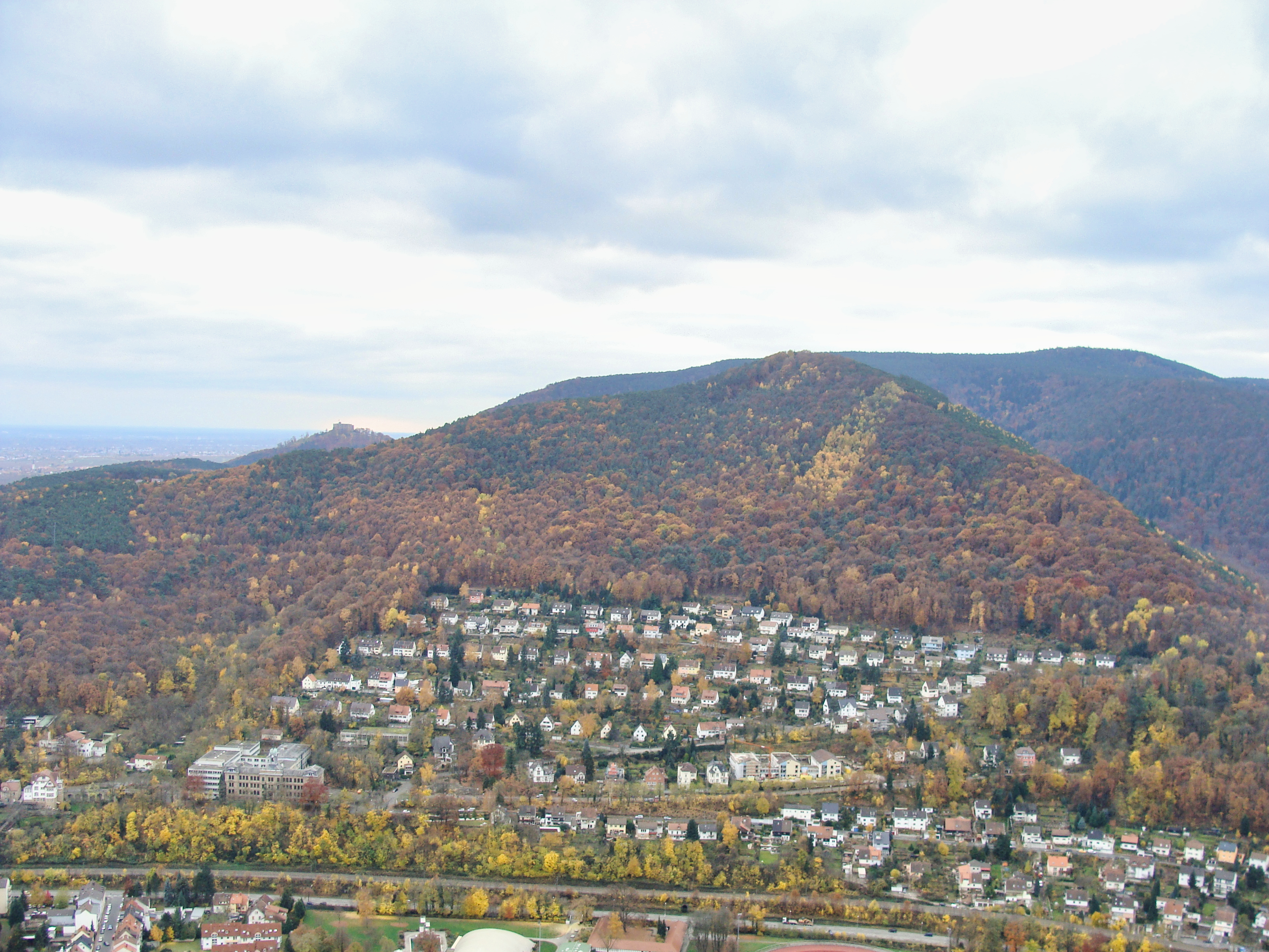 Nollenkopf (Pfalz)